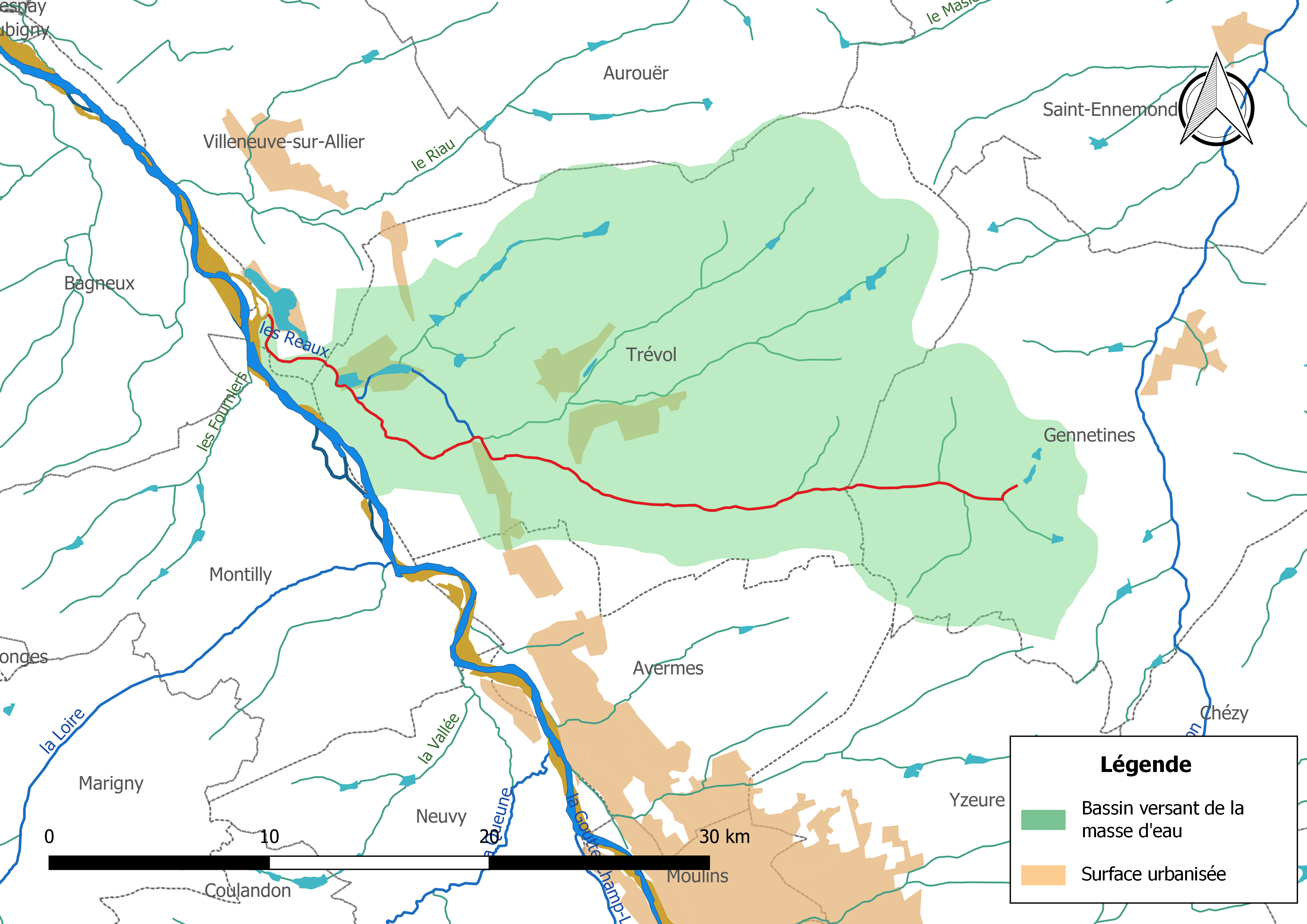 Carte de la masse d'eau « FRGR1920 », avec mise en exergue du cours d'eau « les Reaux » (en rouge).